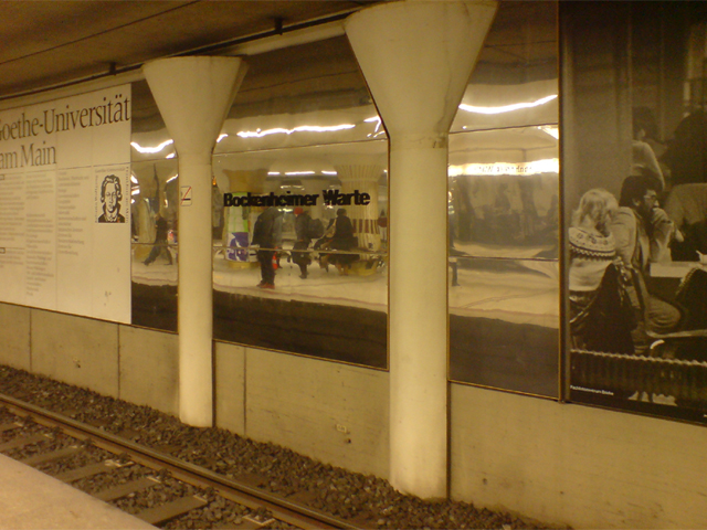 Wandverkleidung, U-Bahnhof Bockenheimer Warte, Frankfurt am Main. Die Wände sind mit 15 Fotos der Fotografin Barbara Klemm aus dem Universitätsalltag von 1985 geschmückt, die Zwischenräume sind mit verspiegelten Metallplatten verkleidet, die den Raum größer erscheinen lassen.